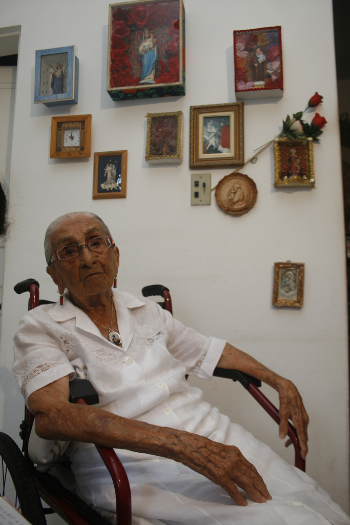 Dona Canô, centenária brasileira, mãe dos cantores Caetano Veloso e Maria Bethânia.